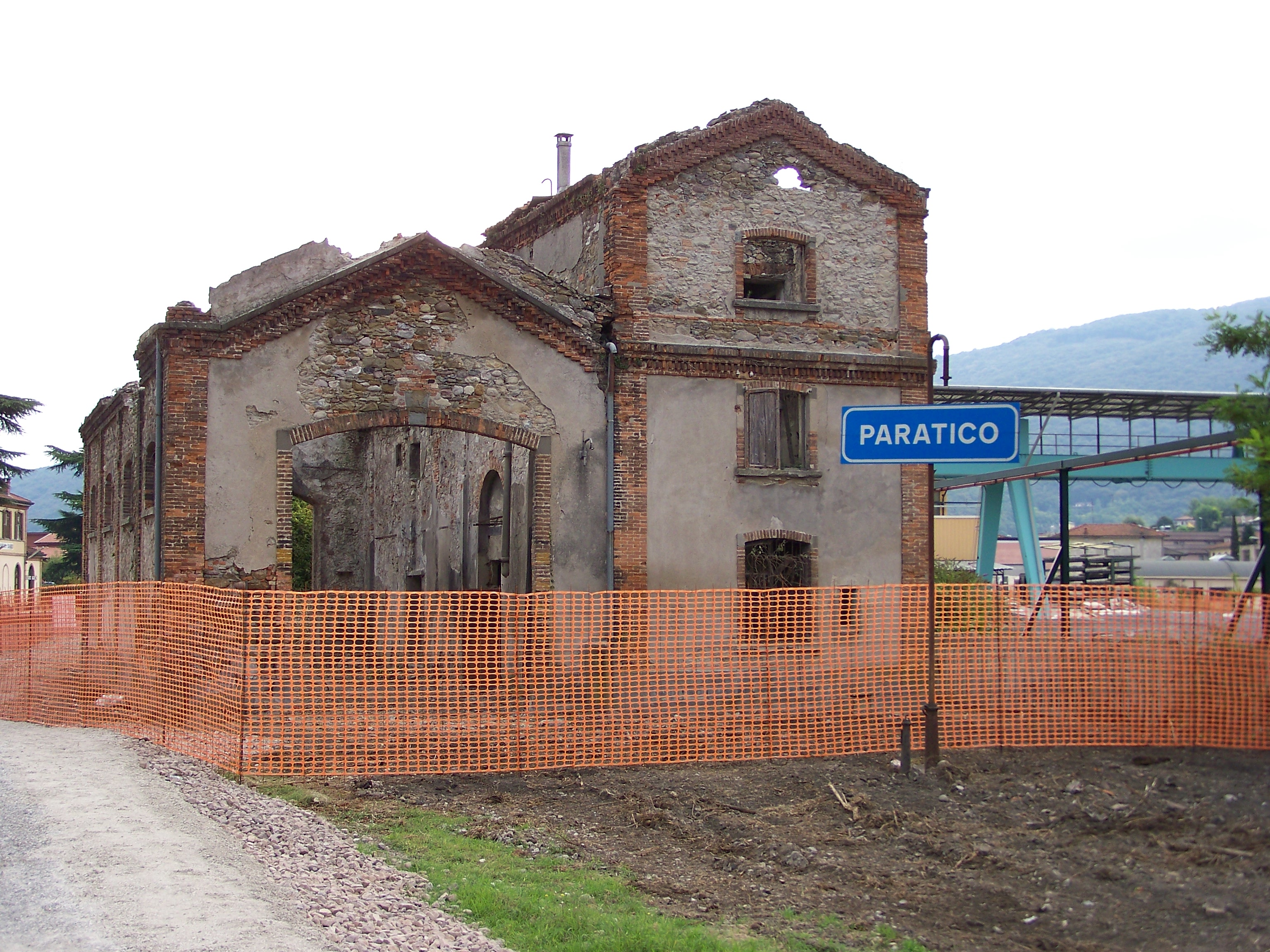 La rimessa locomotive della stazione di Paratico-Sarnico prima del restauro e trasformazione in nuovo fabbricato viaggiatori a servizio del piazzale sud.